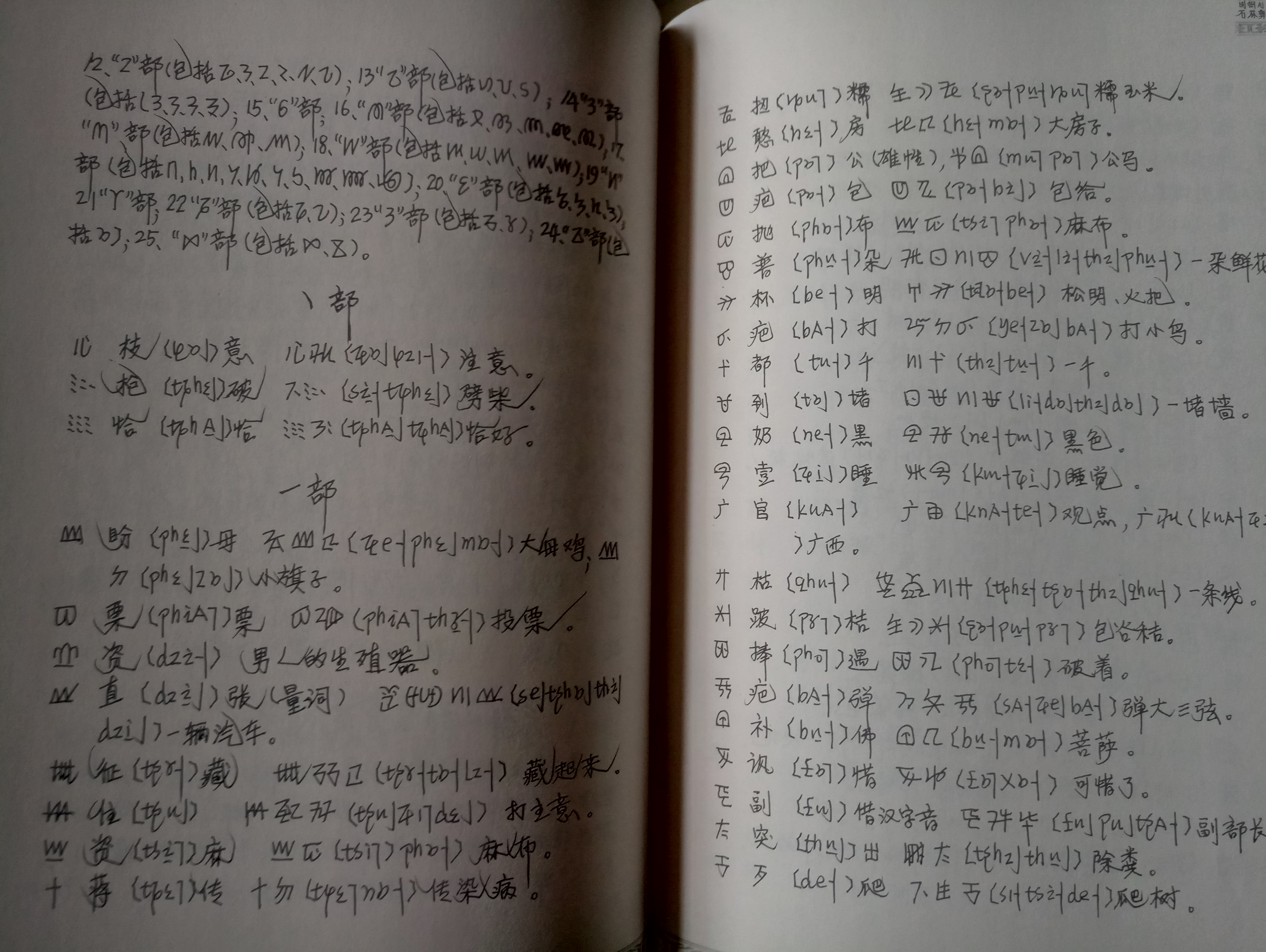 石林彝文自学读本内页